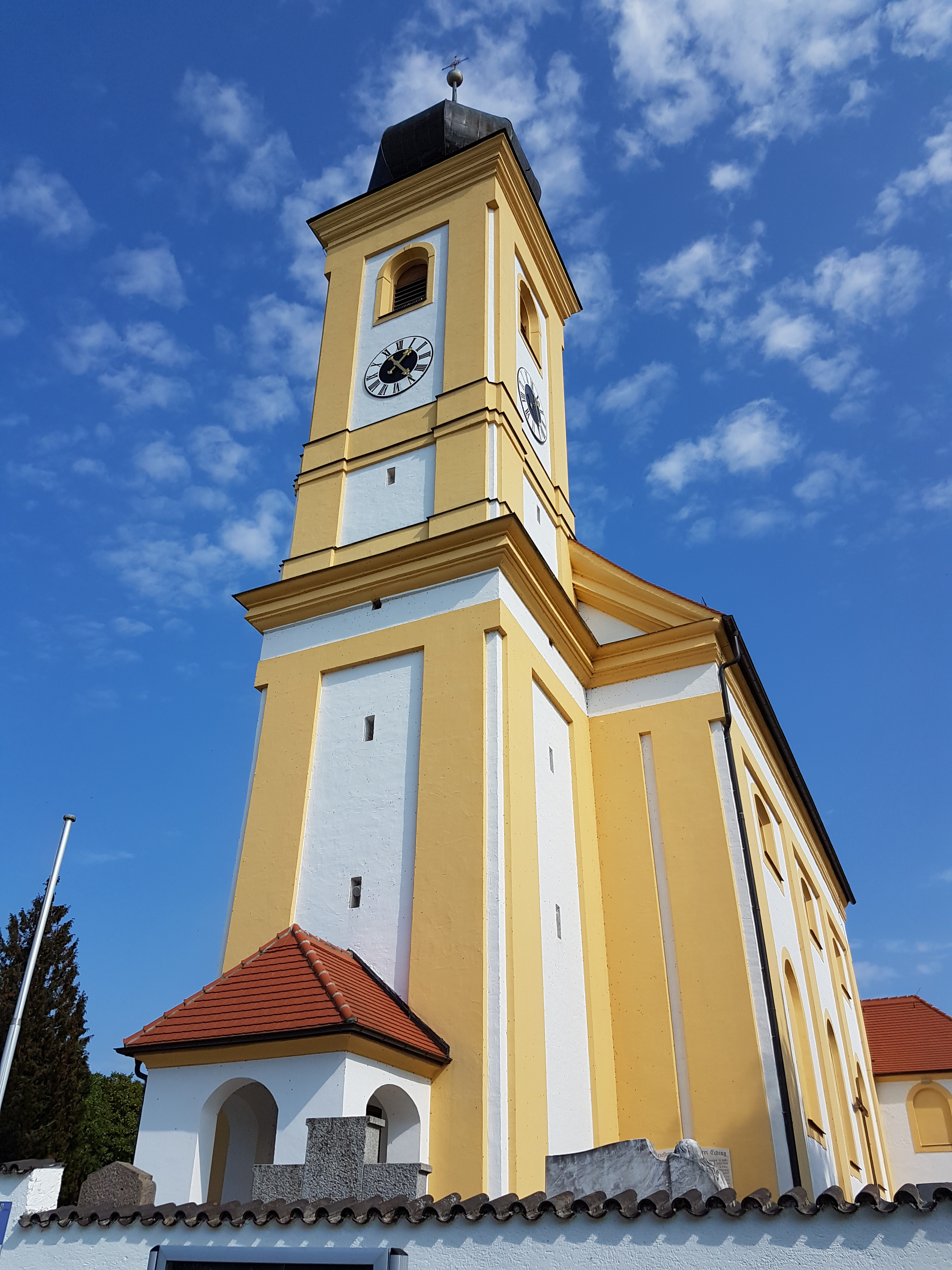 Pfarrkirche Eching St. Johannes BaptistThis is a photograph of an architectural monument.